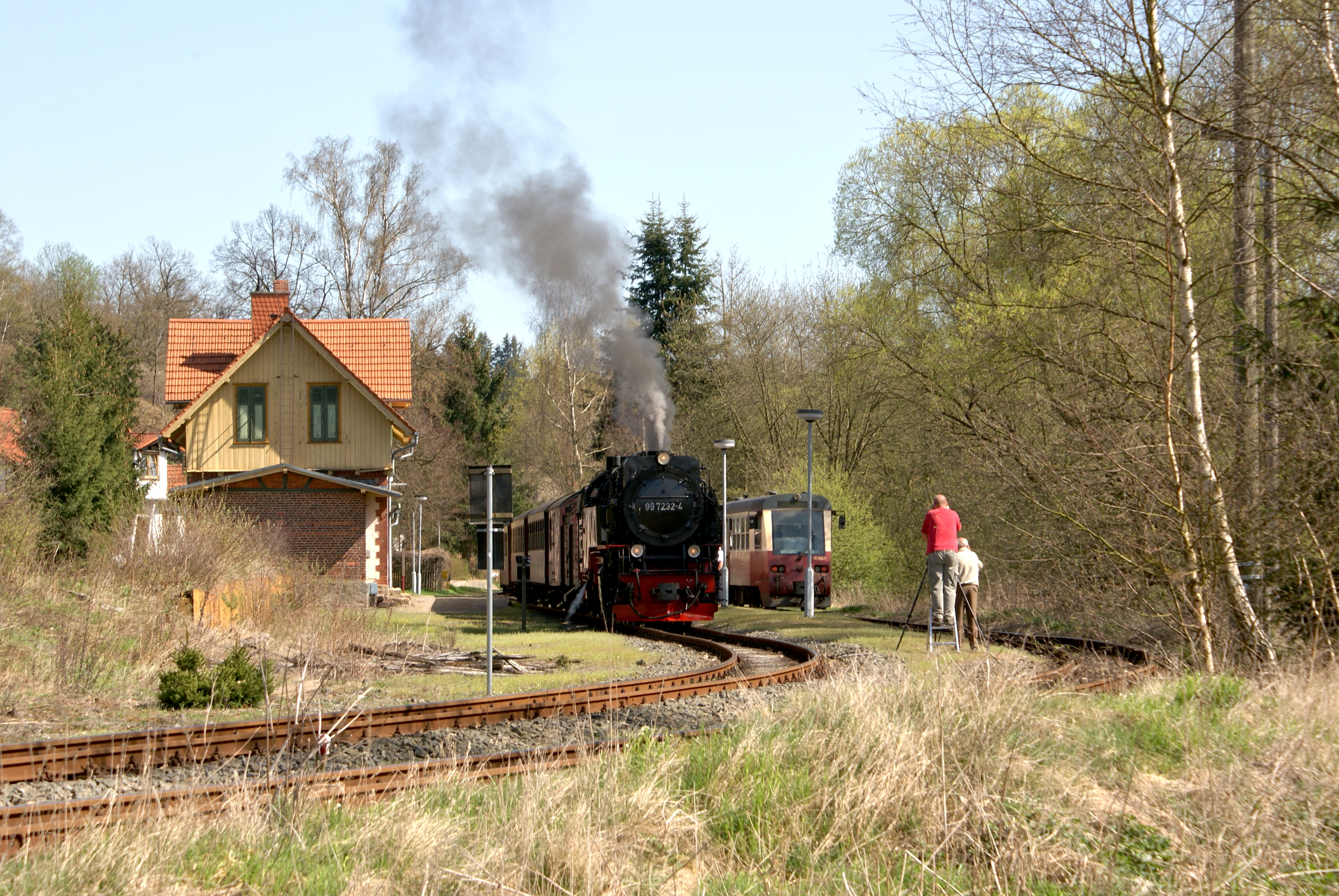 Bahnhof Strassberg/Harz der HSB am 28. April 2012